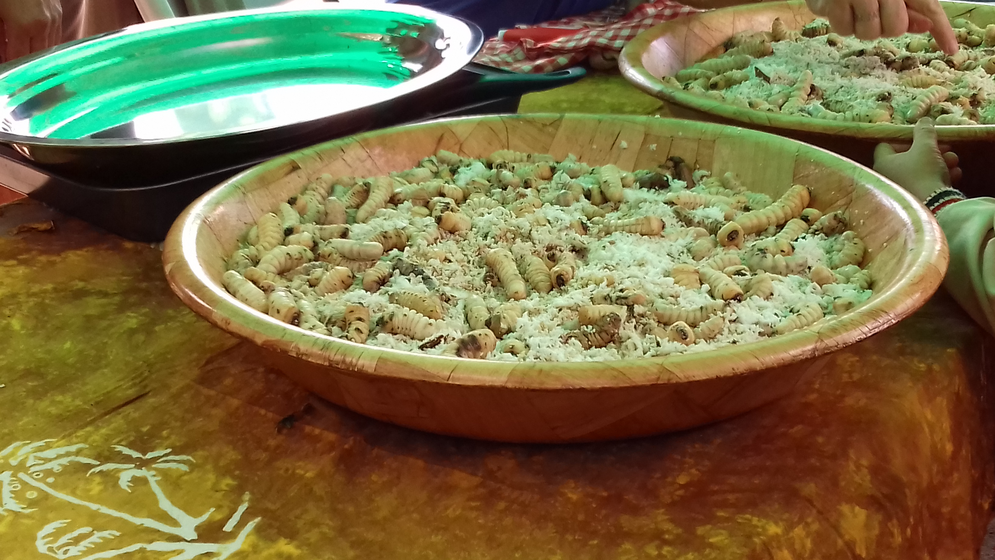 Vers de bancoule en train de dégorger dans du coco râpé. Photo prise lors de la fête du ver de bancoule à Farino, en Nouvelle-Calédonie (Province Sud), le 8 septembre 2019.